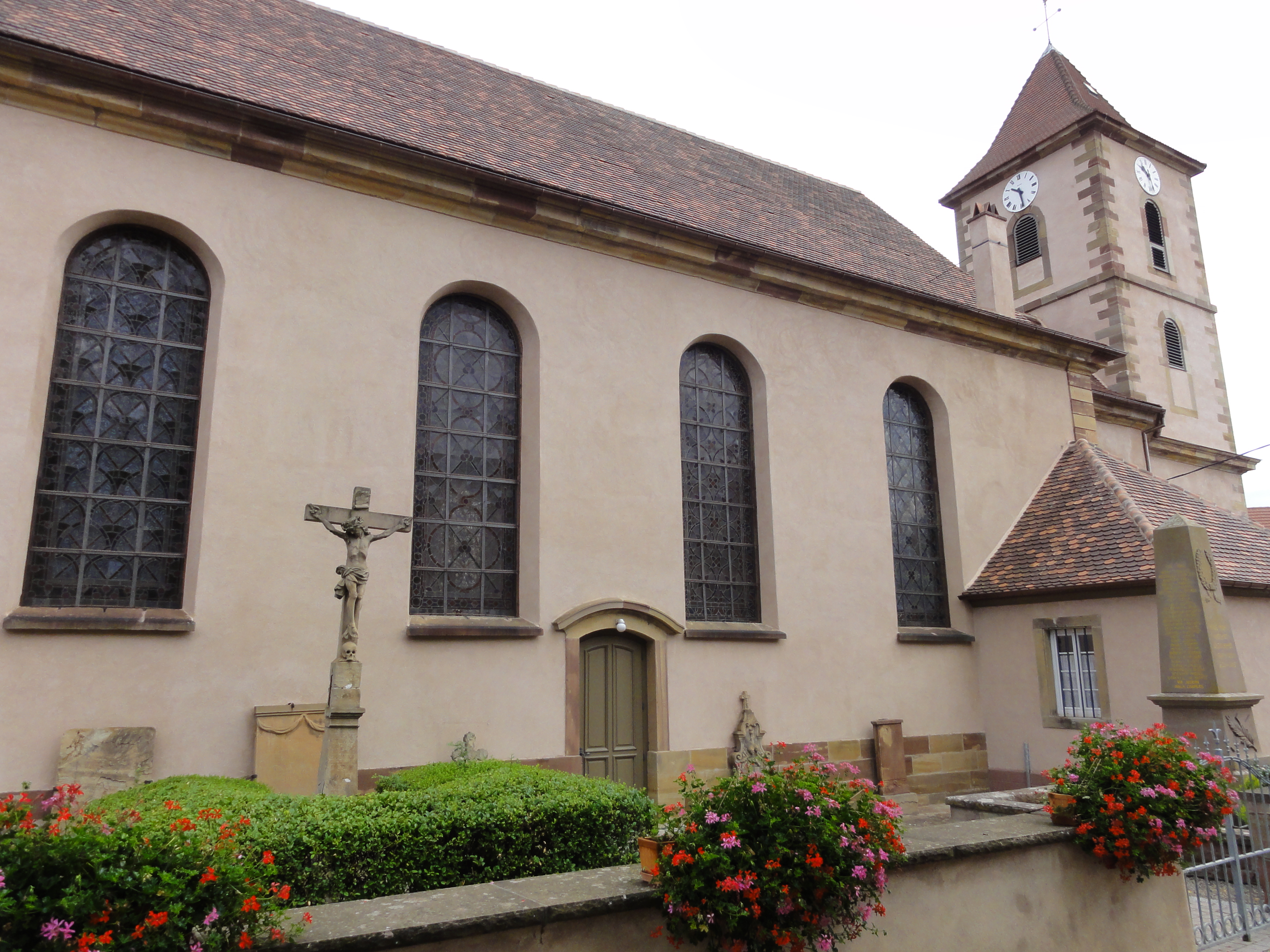 Alsace, Bas-Rhin, Église Saint-Blaise de Dahlenheim (IA67006230).